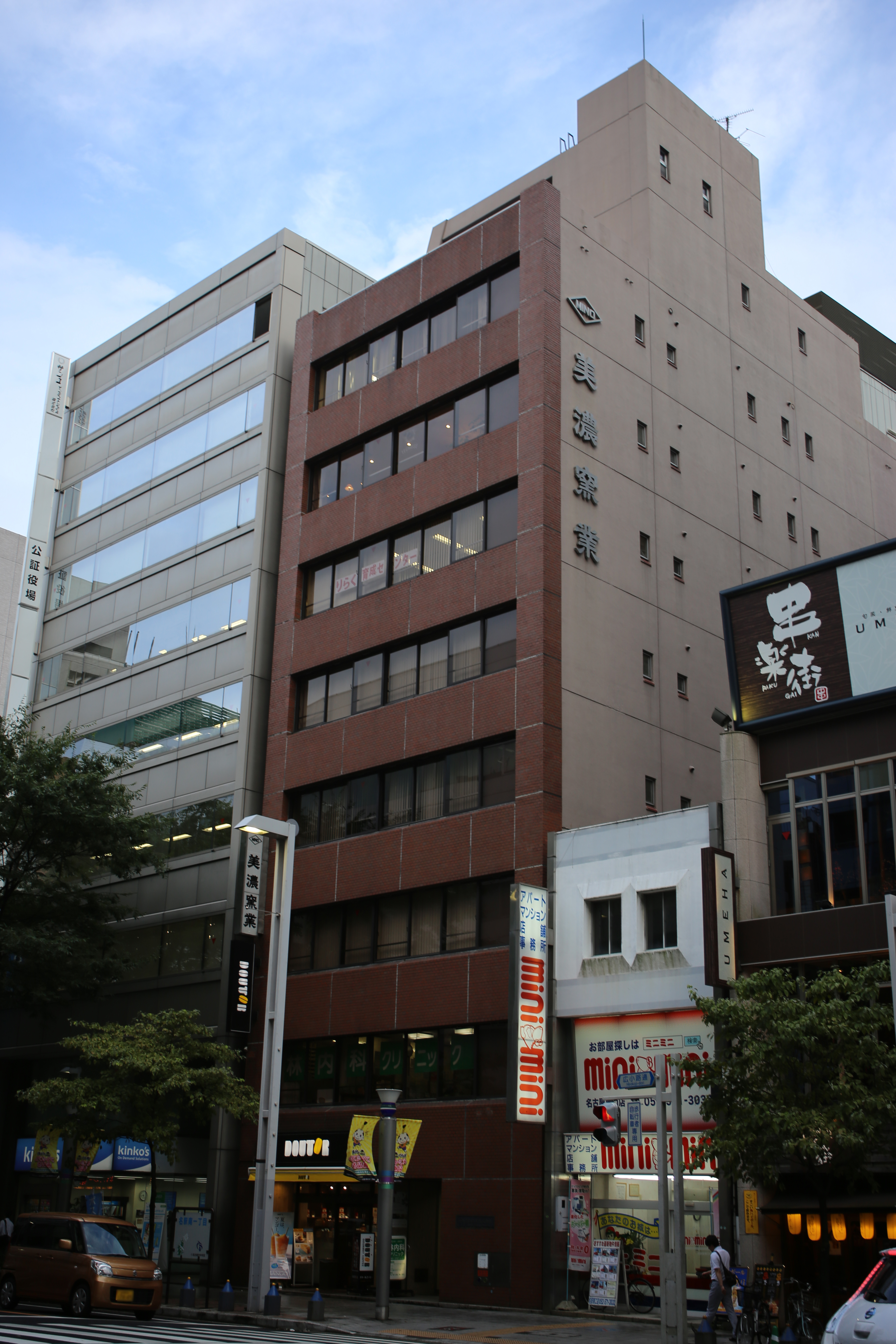 名古屋市中村区名駅南一丁目の美濃窯業（名古屋）本社を北側公道西側より撮影。ただし、ナンバープレートにつき画像処理済。